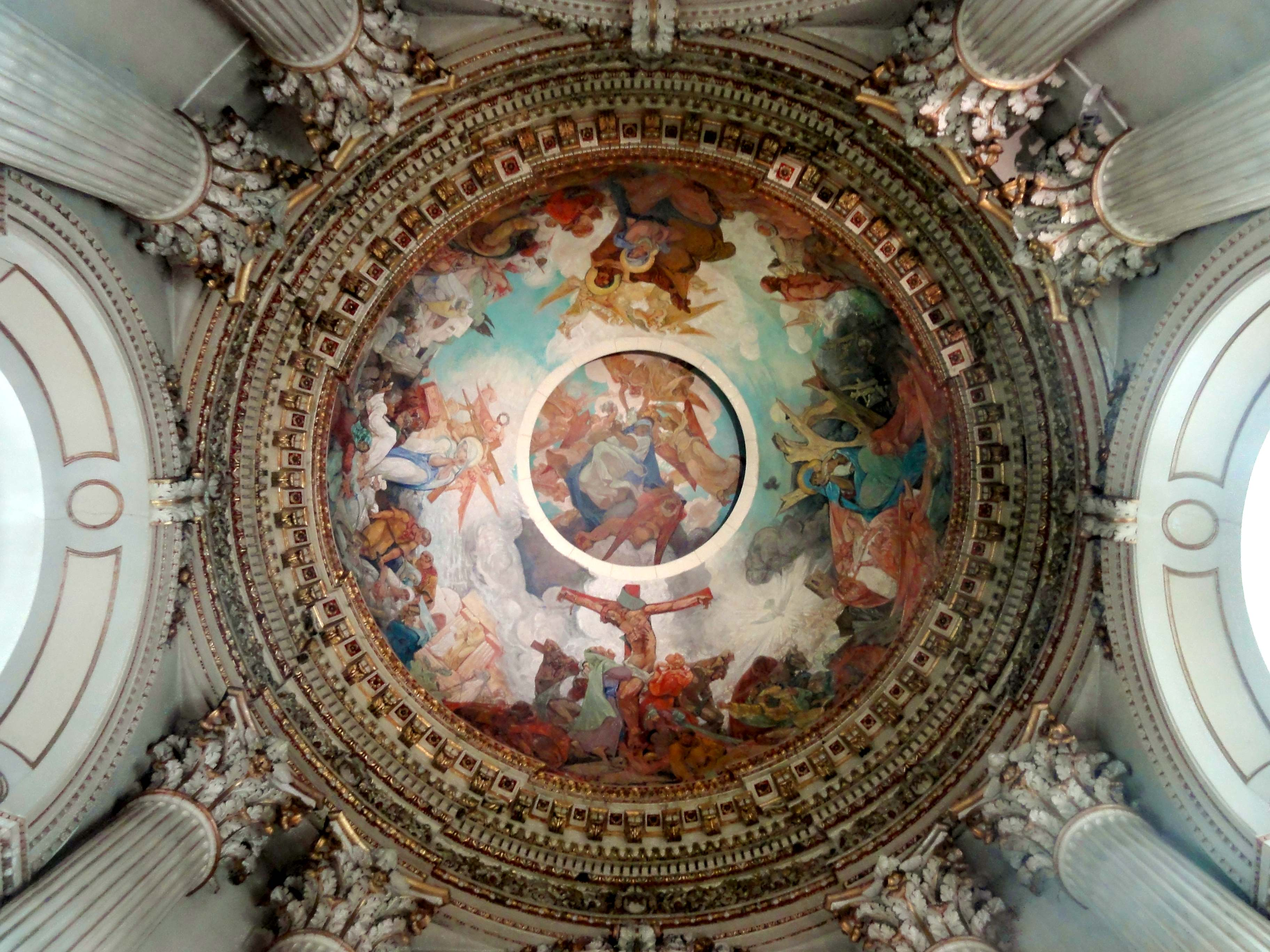 Intérieur de la cathédrale - voir le titre du fichier.